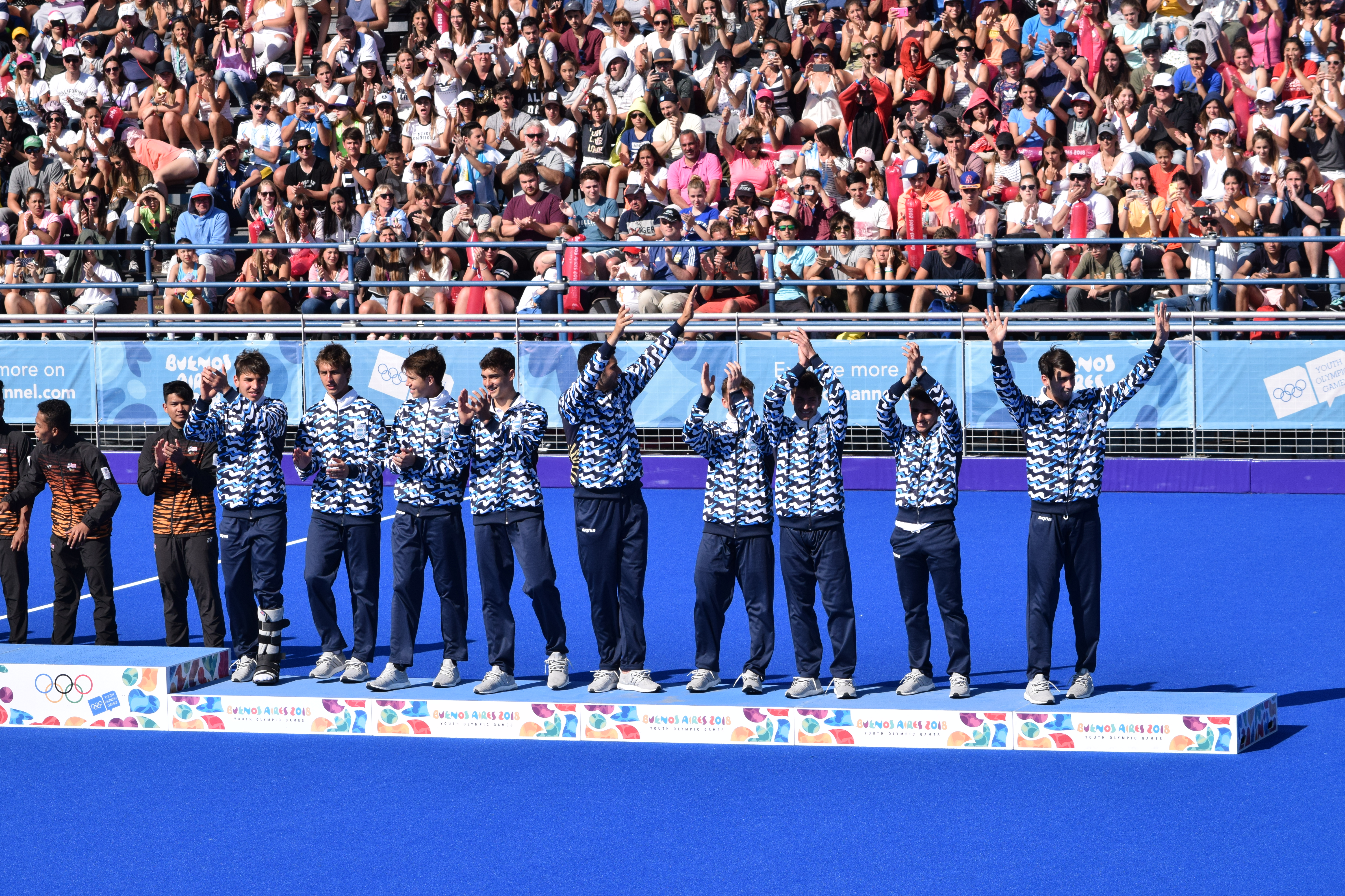 Ceremonia de premiación durante los Juegos Olímpicos de la Juventud 2018 en Buenos Aires. Tarde del 14 de octubre. Nehuen HERNANDO, Facundo ZARATE, Ignacio IBARRA, Gaspar GARRONE, Tadeo MARCUCCI, Santiago MICAZ, Facundo SARTO, Lisandro ZAGO y Agustin CABANA.